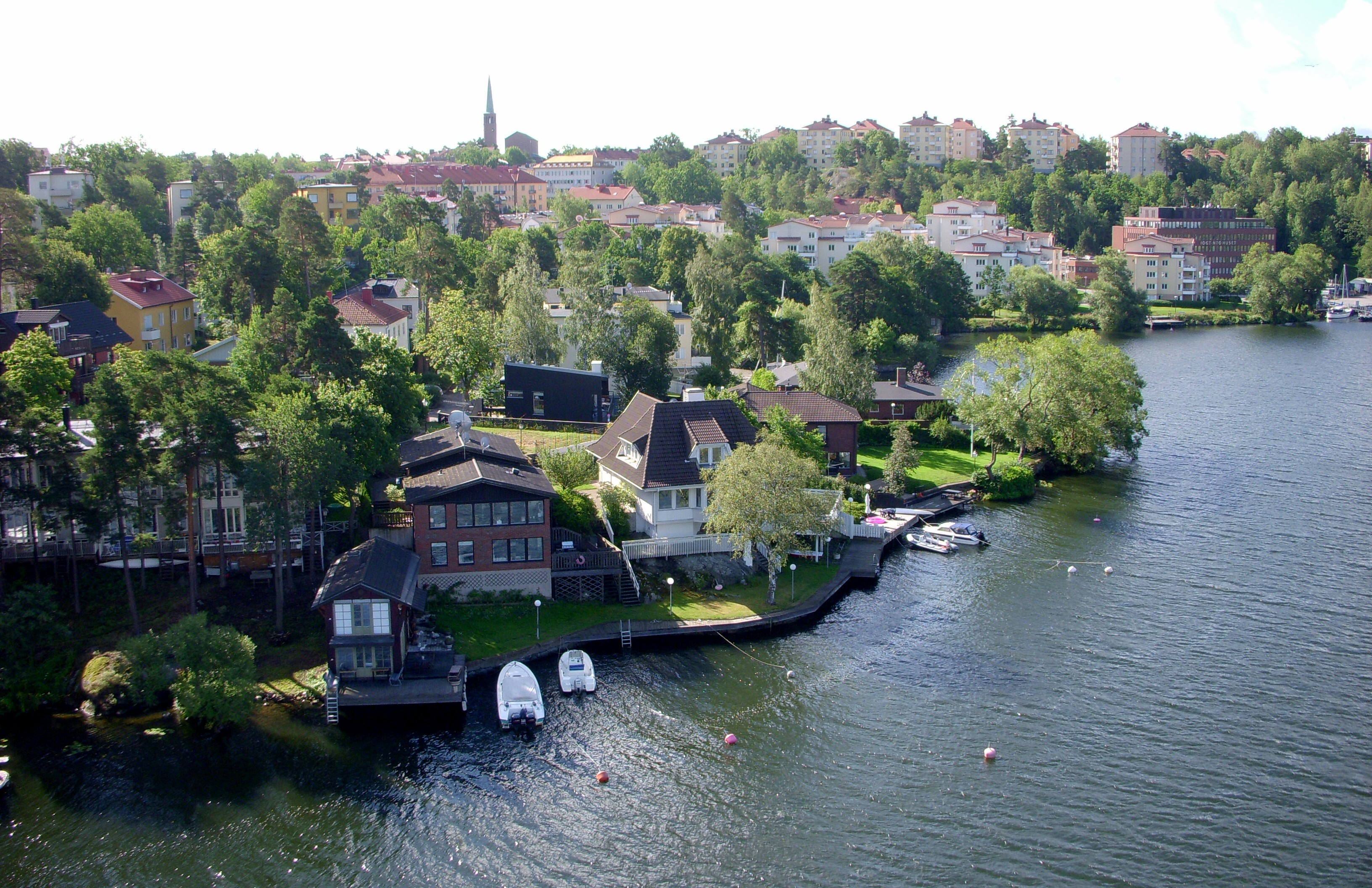 Stora Essingen i Stockholm, vy från Alviksbron